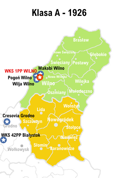 Rozgrywki w piłce nożnej w Wileńskim OZPN w 1926 roku